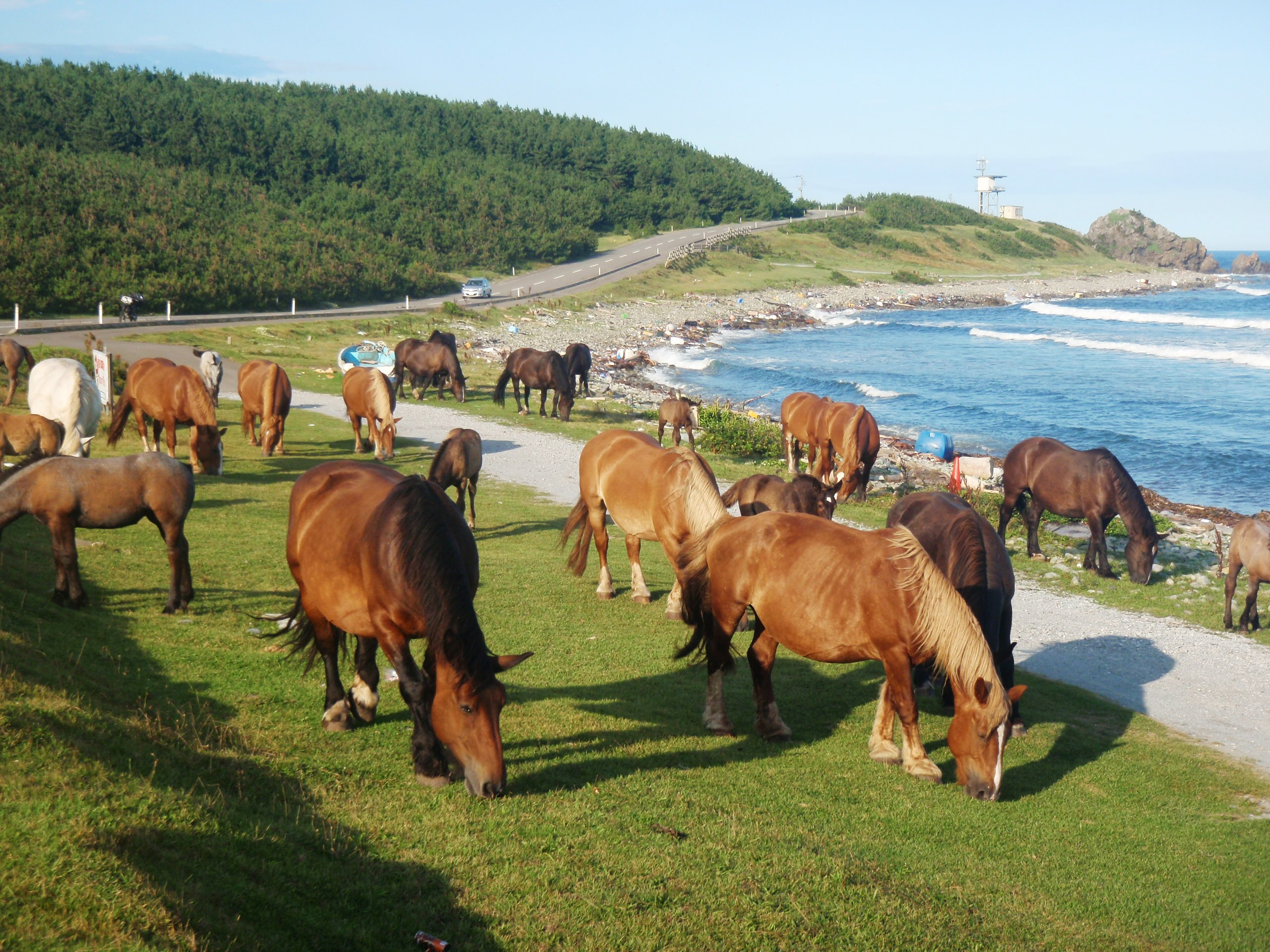 寒立馬